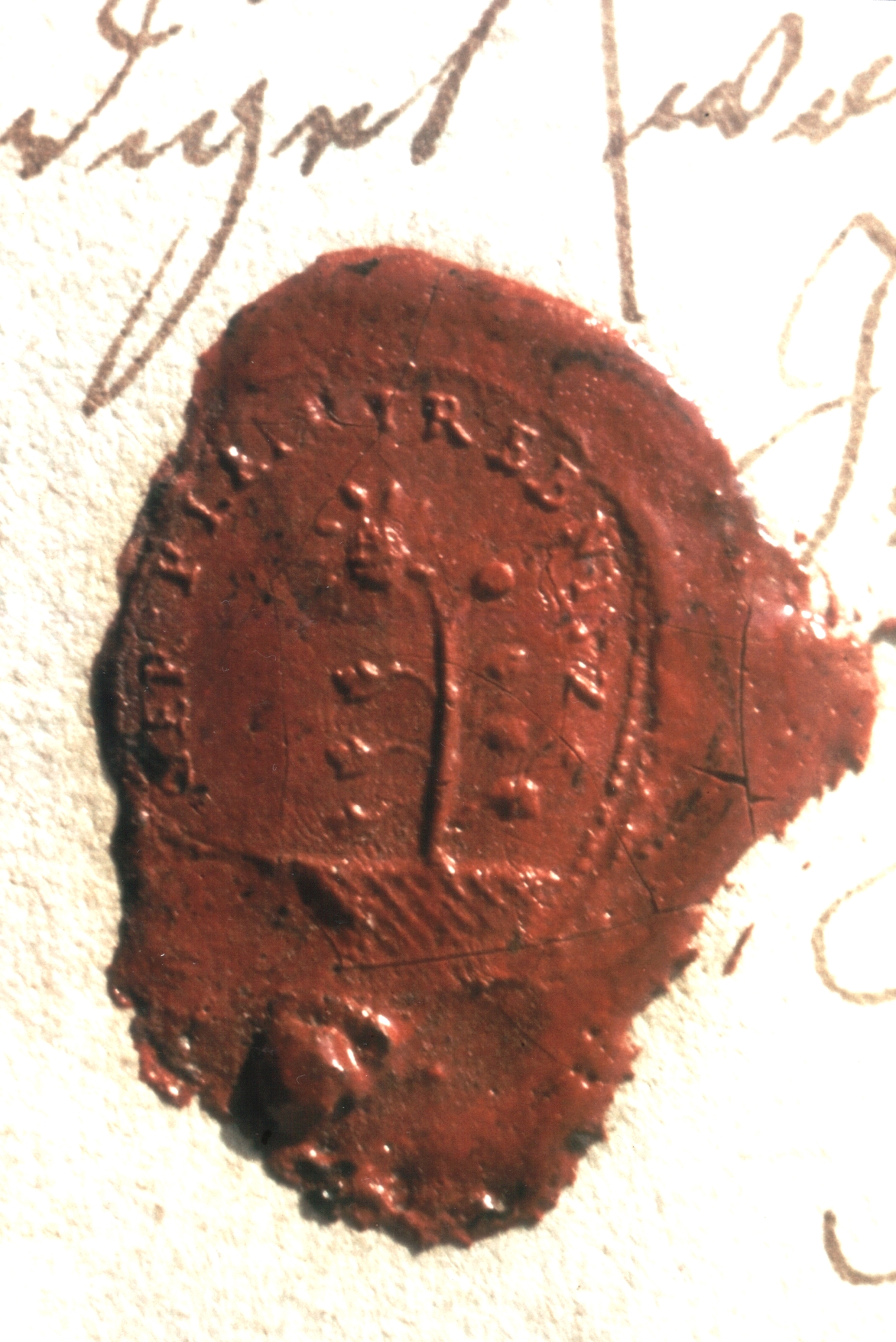 Siegel des Erbgerichts Kleindrebnitz: Sonnenblume mit sieben Laubblättern und zwölf Strahlenblüten.